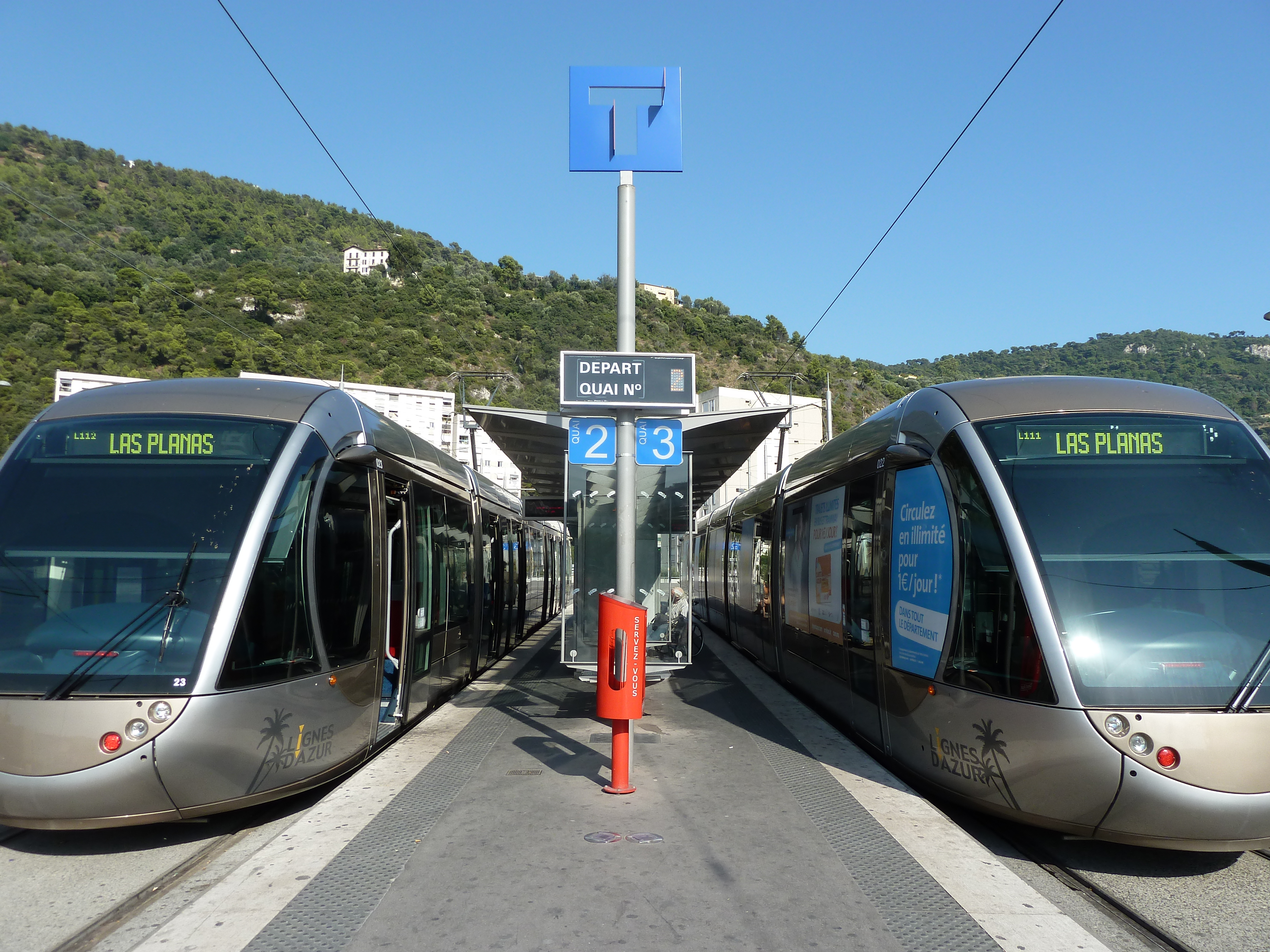 Deux tramway en arrêt à la station Pont Michel, Nice